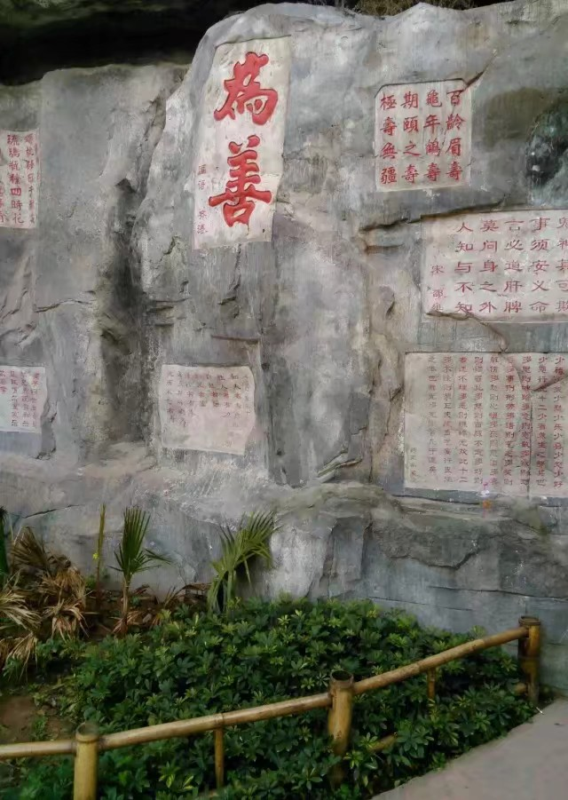 长寿菩提古镇景点之一